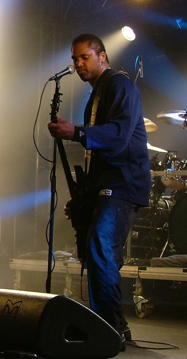 Mike Alexander from Evile, at Tuska 2009